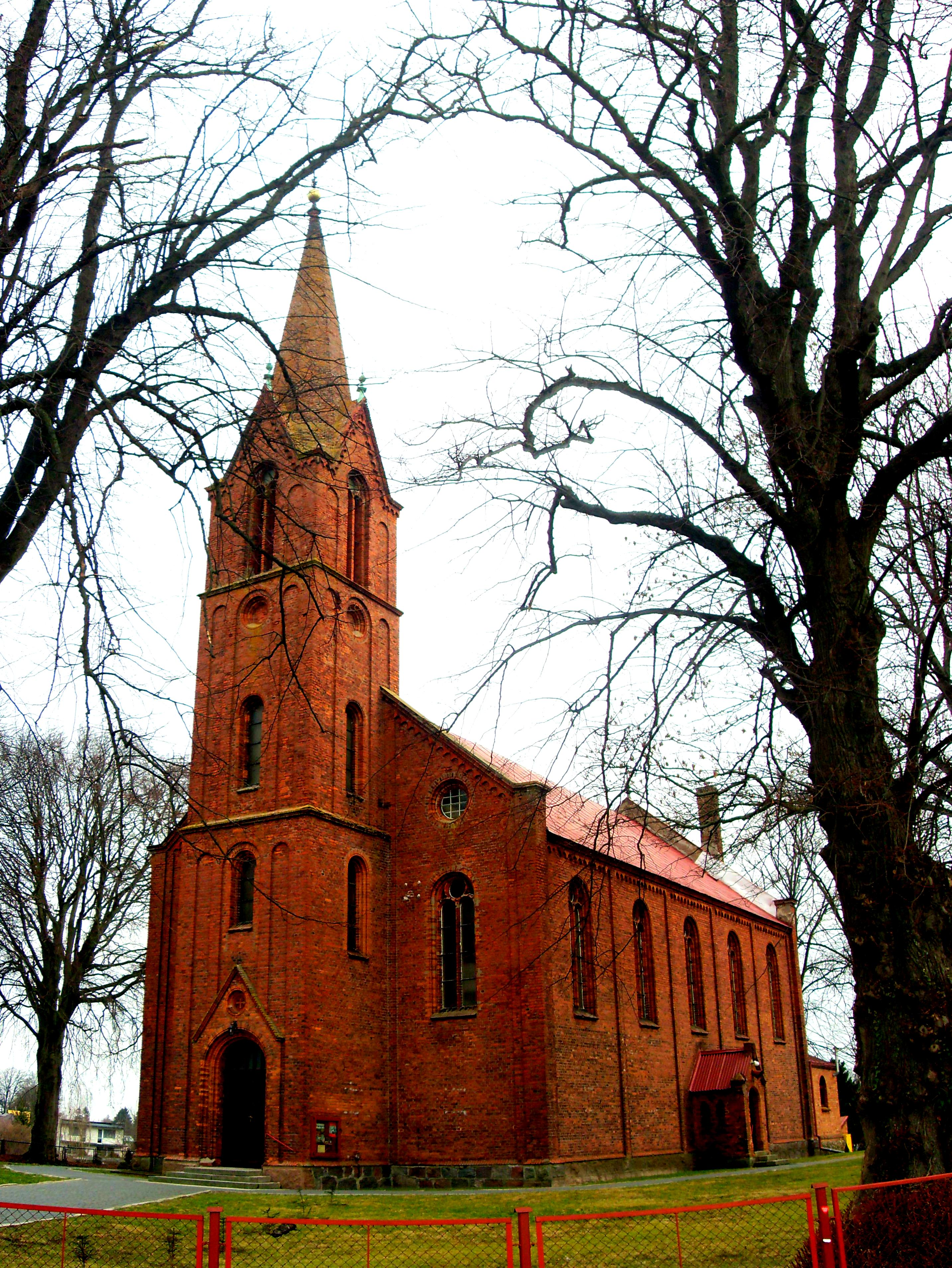 Kościół Wniebowstąpienia Pańskiego w Dygowie